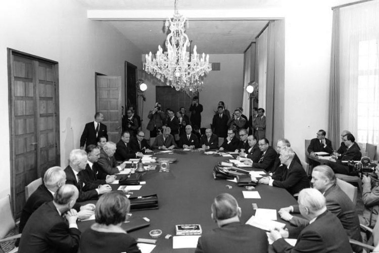 1965 Sitzung des Bundeskabinetts